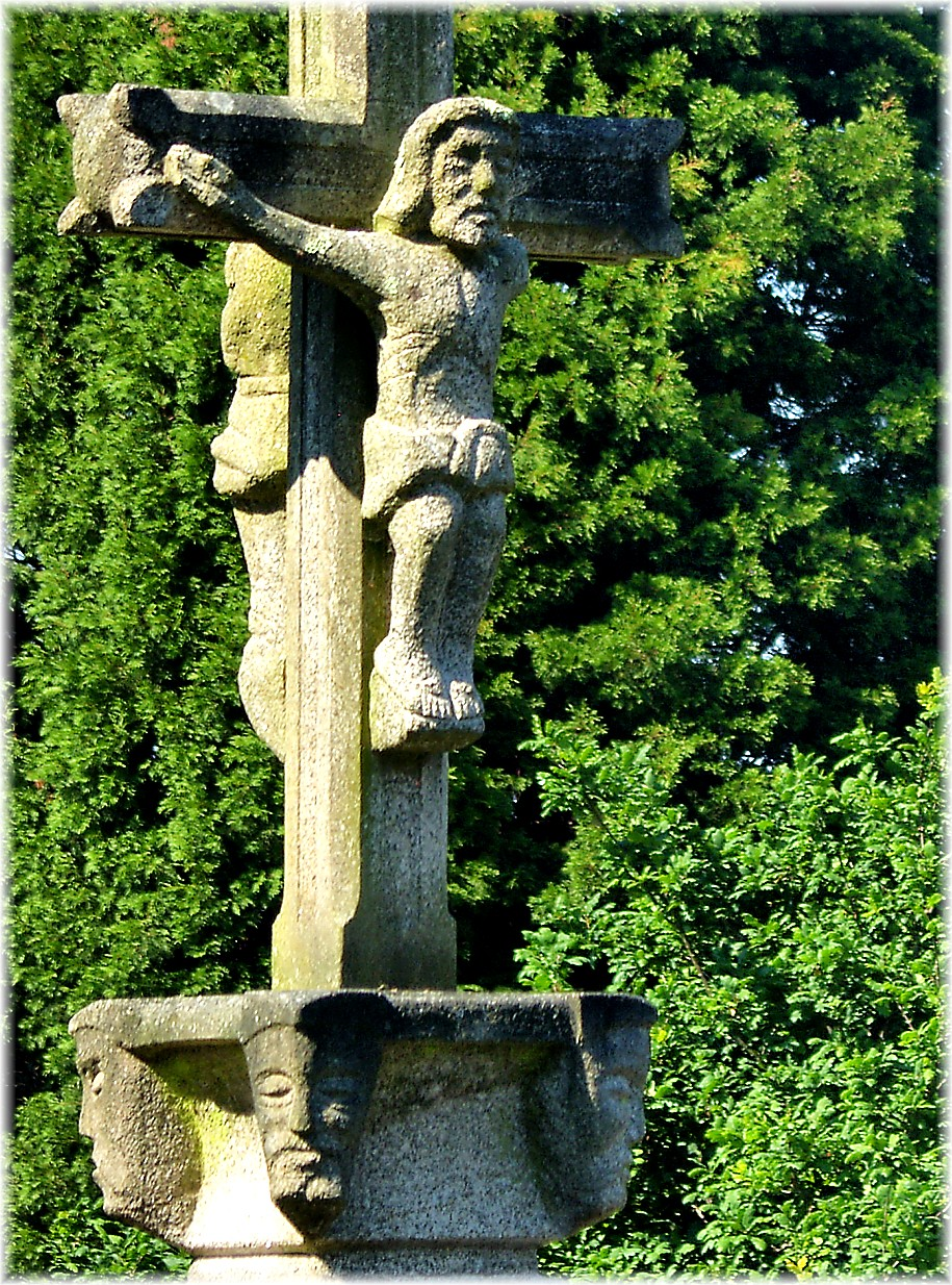 Cruceiro. San Martiño do Orto, Abegondo